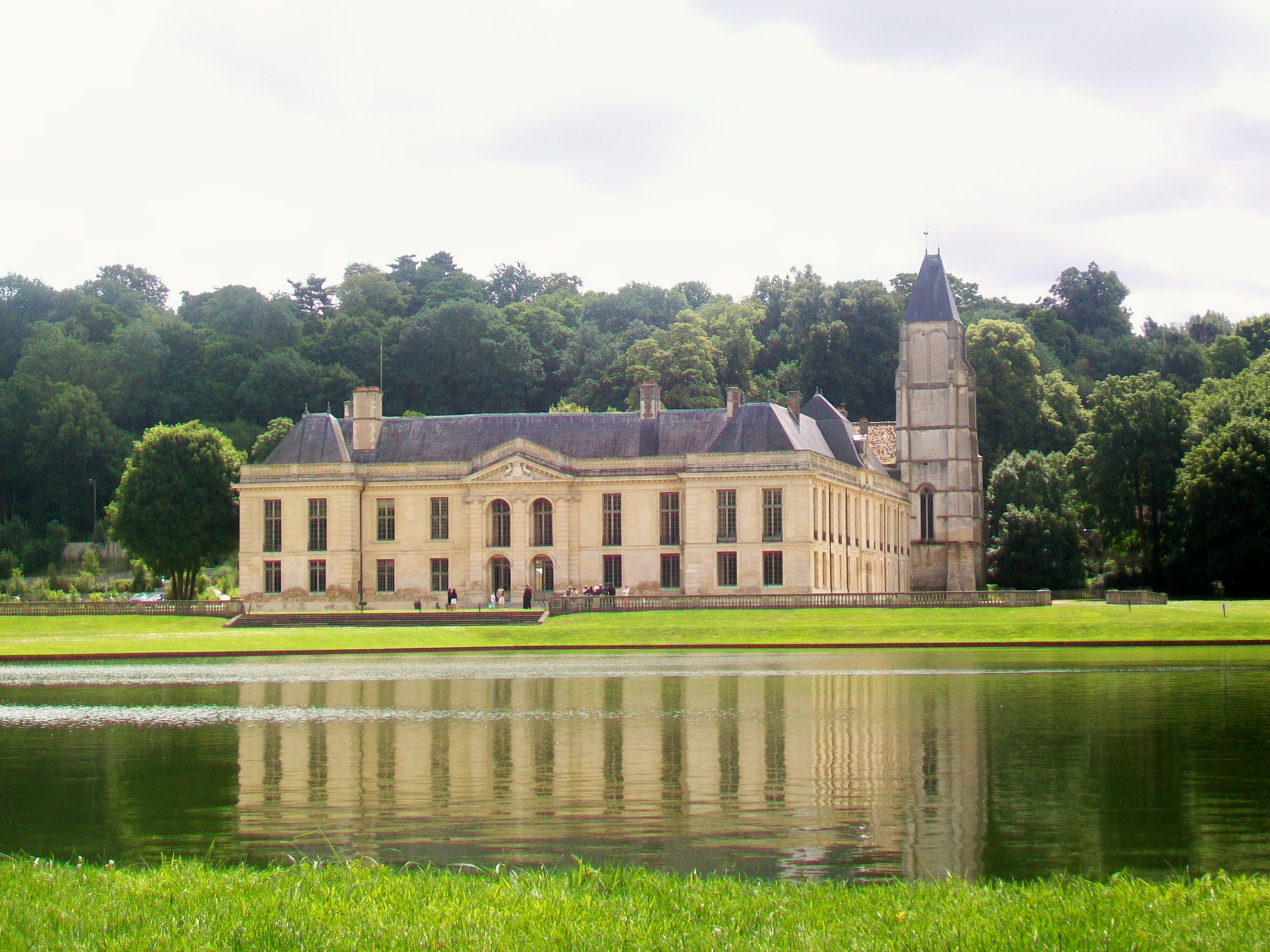 La façade nord-ouest du château et la tour de l'église Saint-Denis.